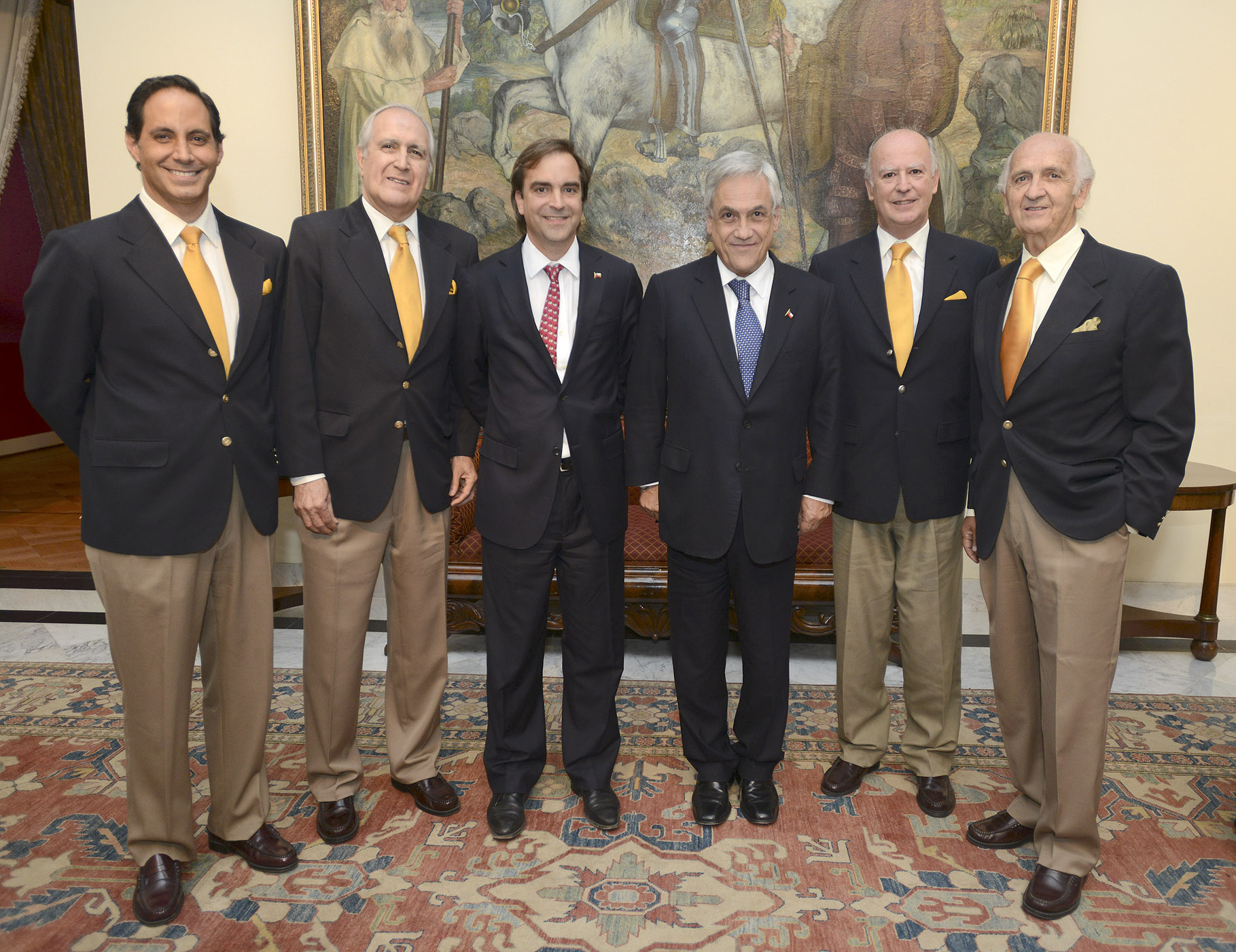 25-03-2012 Premio a la Música Nacional Presidente de la República